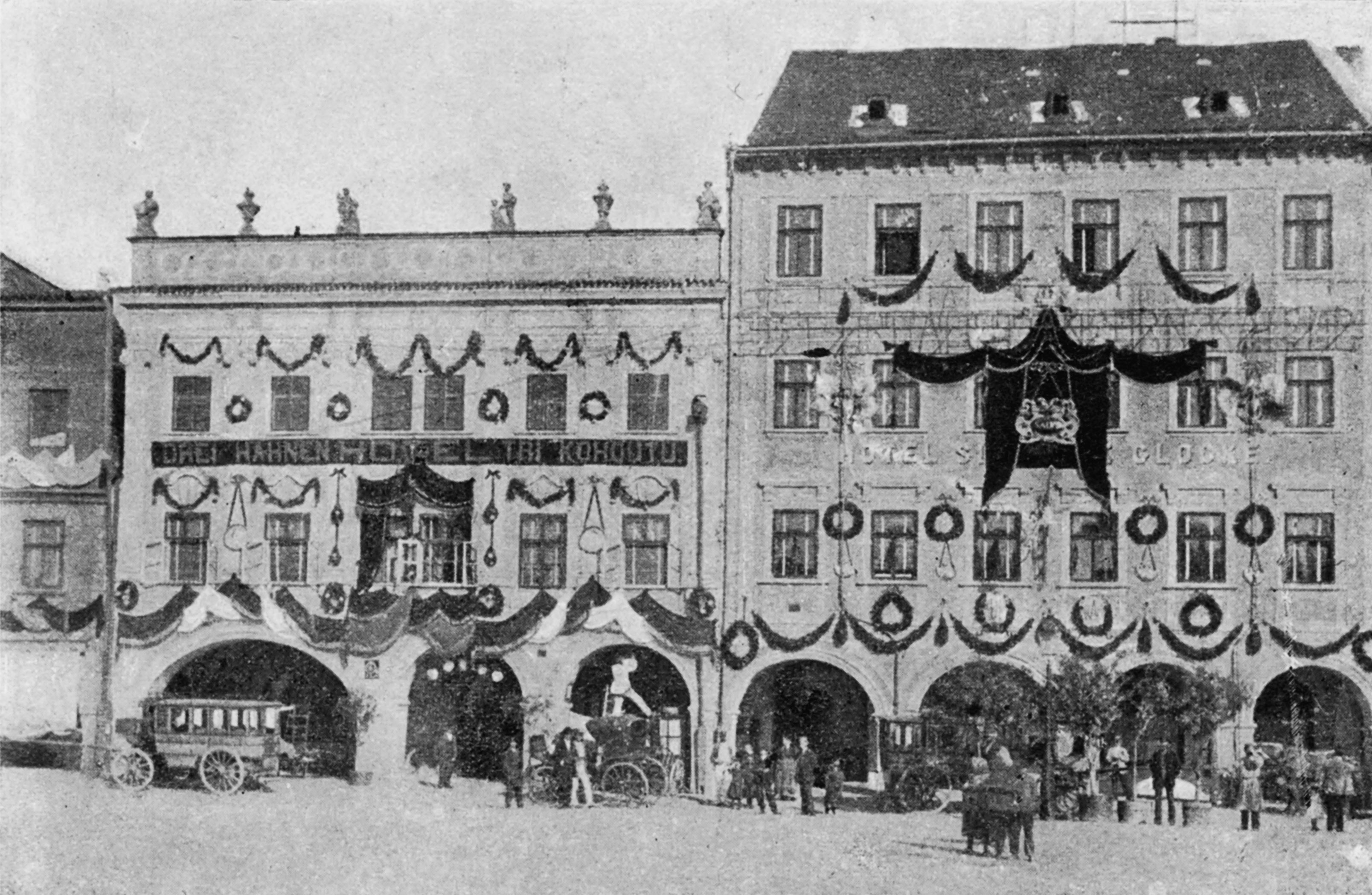 Album starých Budějovic. Vlevo původní budova hotelu U Tří kohoutů (vyhořela 4. 6. 1902), vpravo hotel Zvon - tehdy Hotel silberne Glocke. (orig. text: Hotel „U tří kohoutů“ na náměstí. Příklad měšťanské stavby z 2. pol. 18. stol. Vyhořel roku 1904. Sošky a vázy v Městském muzeu).